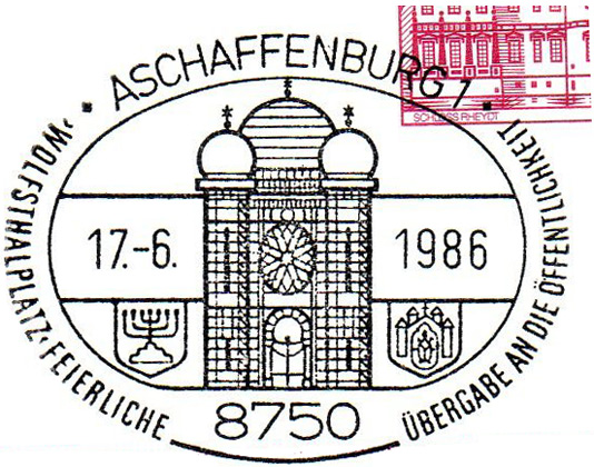 Sonderstempel Deutsche Bundespost zur Einweihung Wolfsthalplatz Aschaffenburg